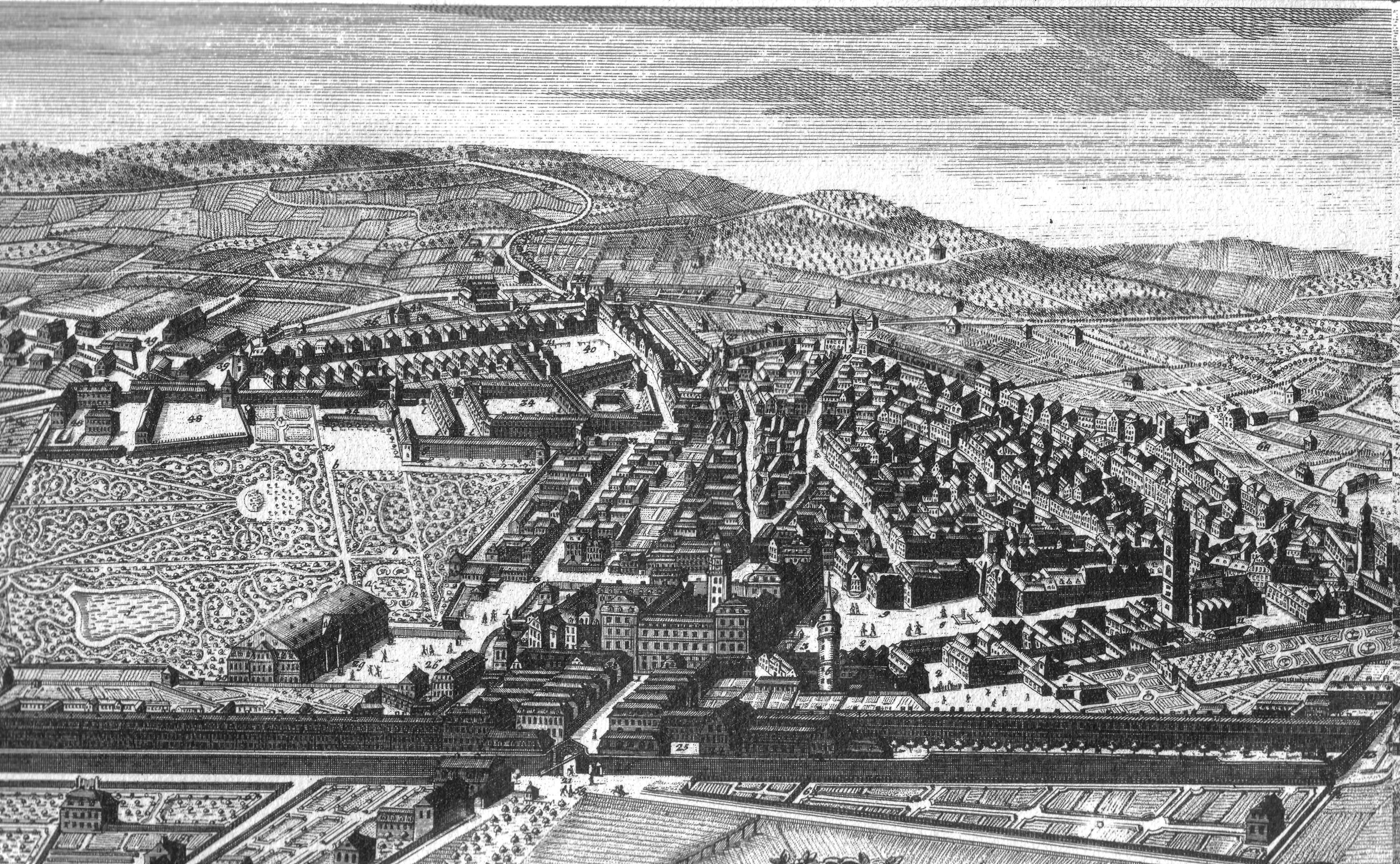 historische Stadtkarte Darmstadt aufgenommen von Johann Jacob Hill 1776